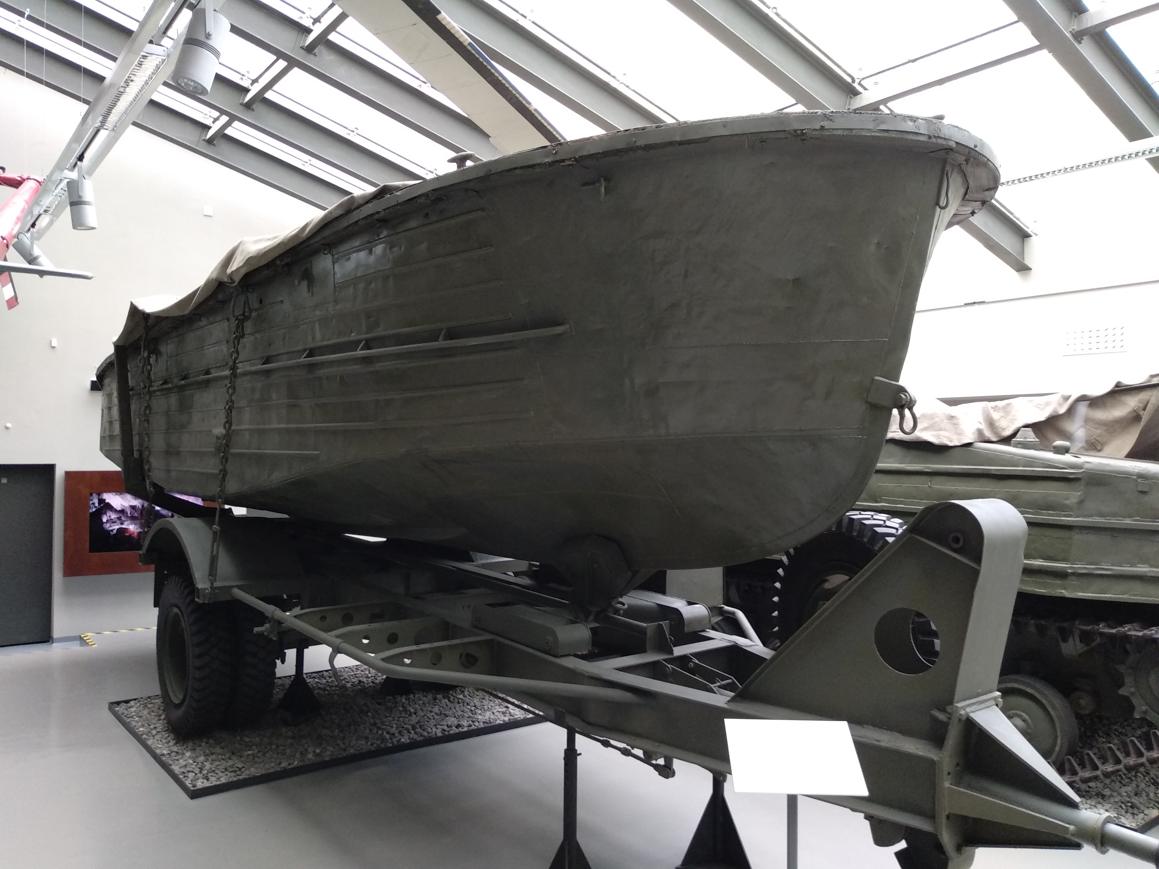 Rzeczny kuter holowniczy typu BMK-90 eksponowany w Muzeum Fortyfikacji i Broni "Arsenał" w Zamościu.